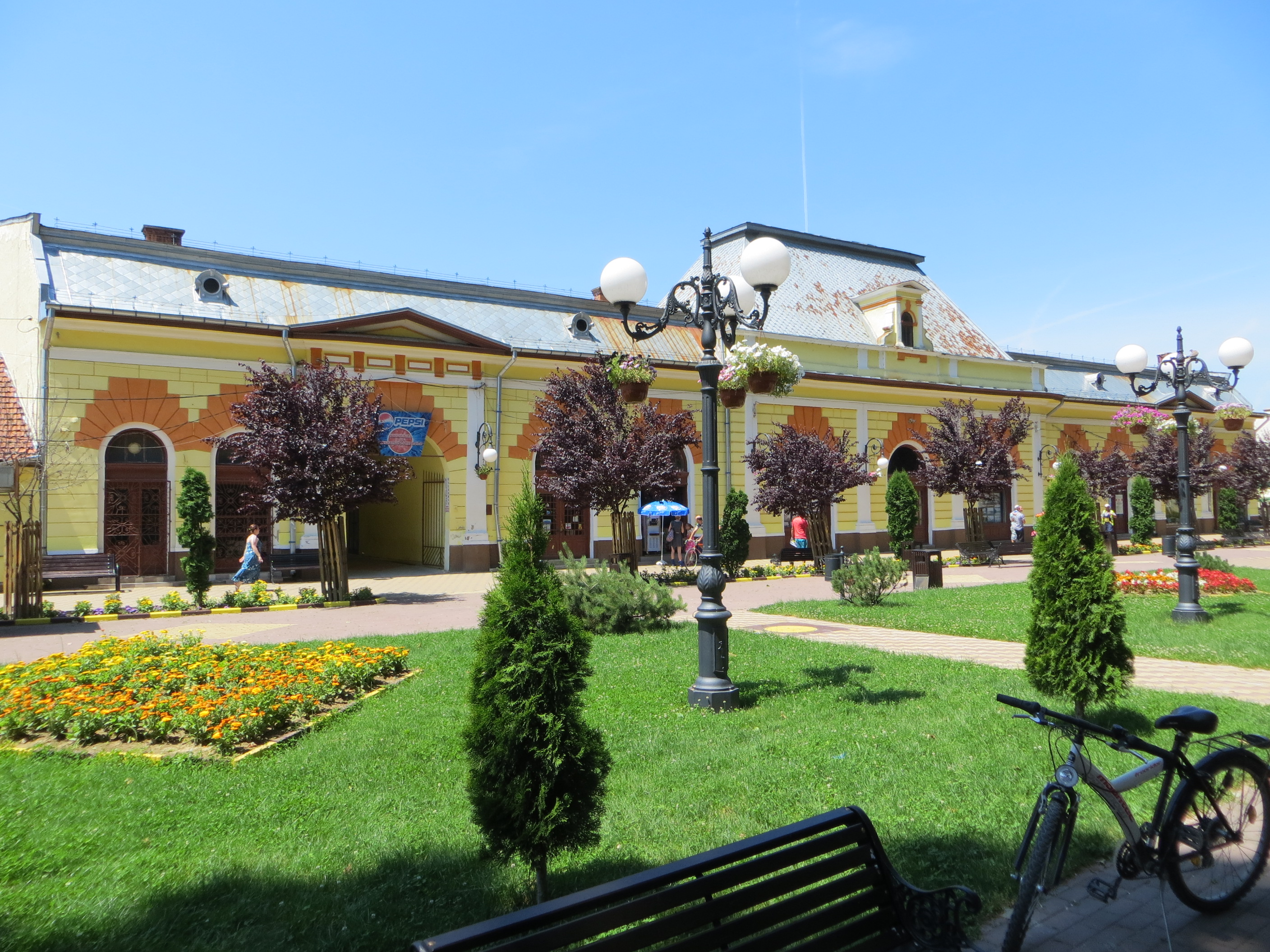 Cazinou „Cassina”